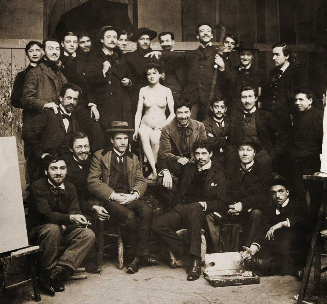 Henri Fabien, peintre et sculpteur, premier à gauche dans la troisième rangée, lors d’un séjour d’étude à Paris ; probablement la classe de Jean-Léon Gérôme, entourant un modèle à l’École des beaux-arts, avant 1902